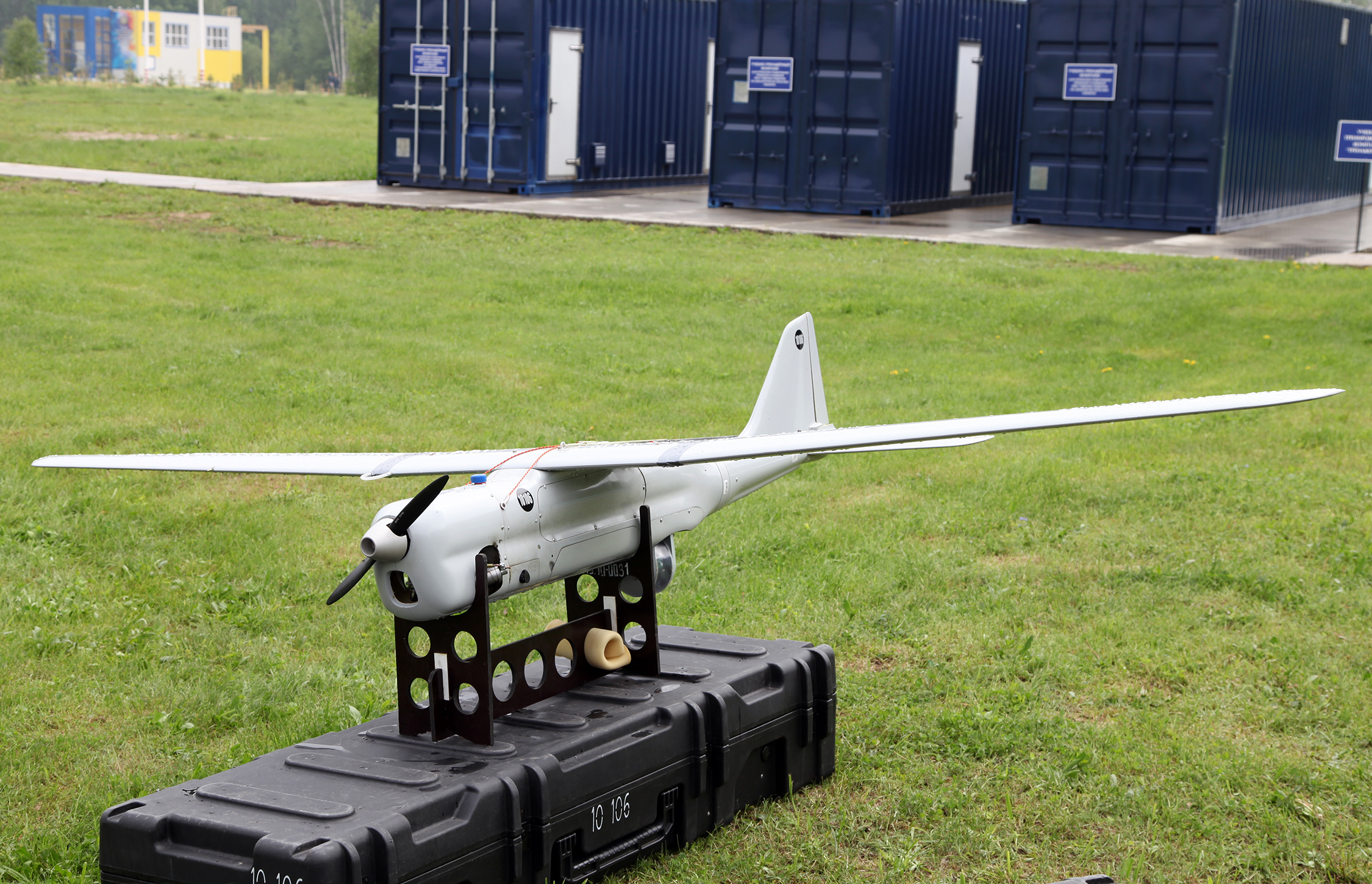 БПЛА Орлан-10 (Orlan-10 UAV)